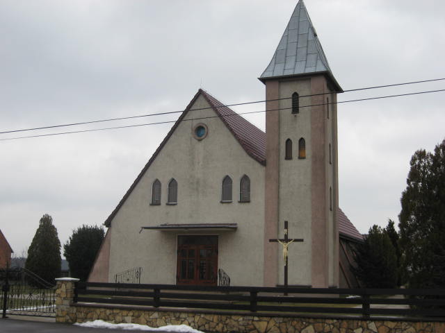 Kościół Świętych Apostołów Piotra i Pawła w Ciarce